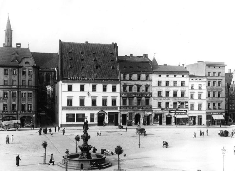 Aufnahme vor 1945 Breslau, wahrscheinlich um 900 von einem Böhmenherzog gegründet, erhielt 1261 Magdeburger Stadtrecht, war Hansestadt, war zeitweilig böhmisch, habsburgisch und kam 1742 an Preußen. Hier residierte seit dem Jahr 1000 ein Bischof, seit 1930 ein Erzbischof für ganz Ostdeutschland. Berühmte Universität und Technische Hochschule. Seit dem 19. Jahrhundert enorme wirtschaftliche Entwicklung und bedeutende Industrie (Oderhafen), wichtigster Warenaustauschplatz zwischen Deutschland und dem slawischen Osten. Landeshauptstadt Schlesiens. 1940: 630 000 Einwohner; heute unter polnischer Verwaltung etwa 3780 000. Im Bild: Der Neumarkt mit dem Neptun-Brunnen ("Gabeljürge" genannt). Hier waren die berühmten alte Bierlokale, hier fand der Kindermarkt und der Topfmarkt statt. Breslau wurdew durch Krieg (Festung) schwer zerstört, ist heute unter polnischer Verwaltung aber auch noch wenig (nur in Industrie- und historischen Teilen) aufgebaut. Die Deutschen wurden vertrieben.